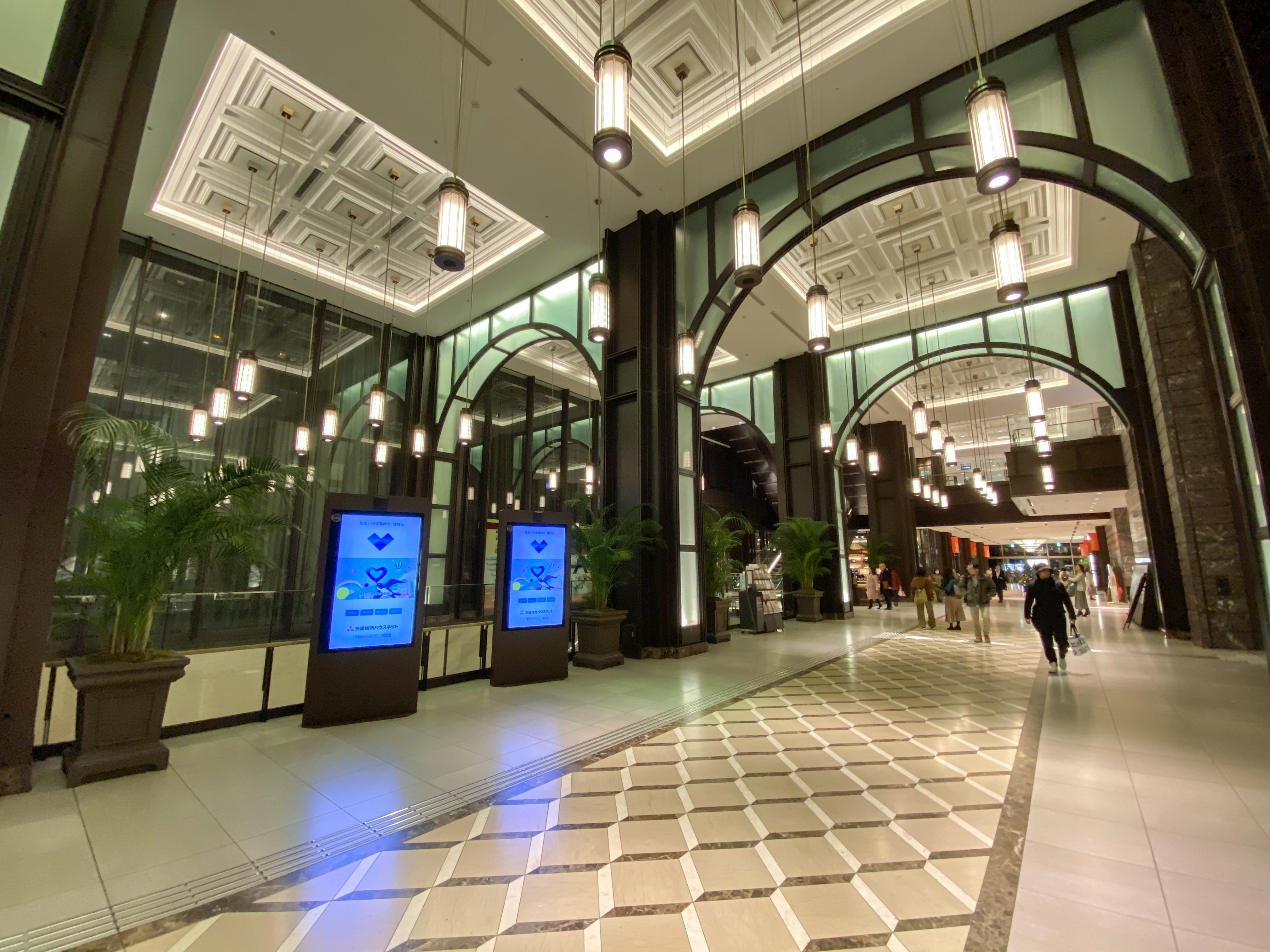 Shin-Marunouchi Building